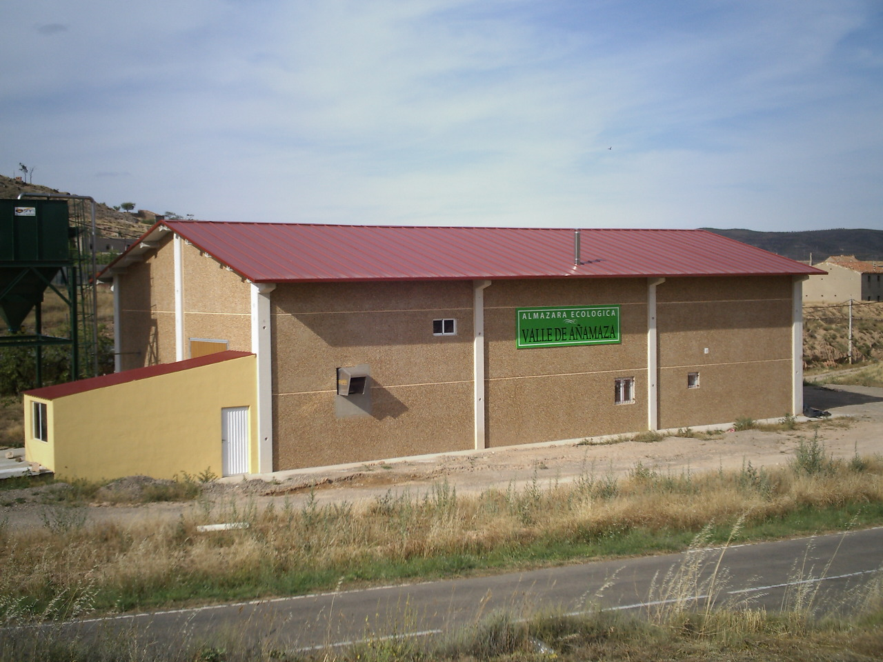 Almazara (molino de aceite). Aceite ecológico